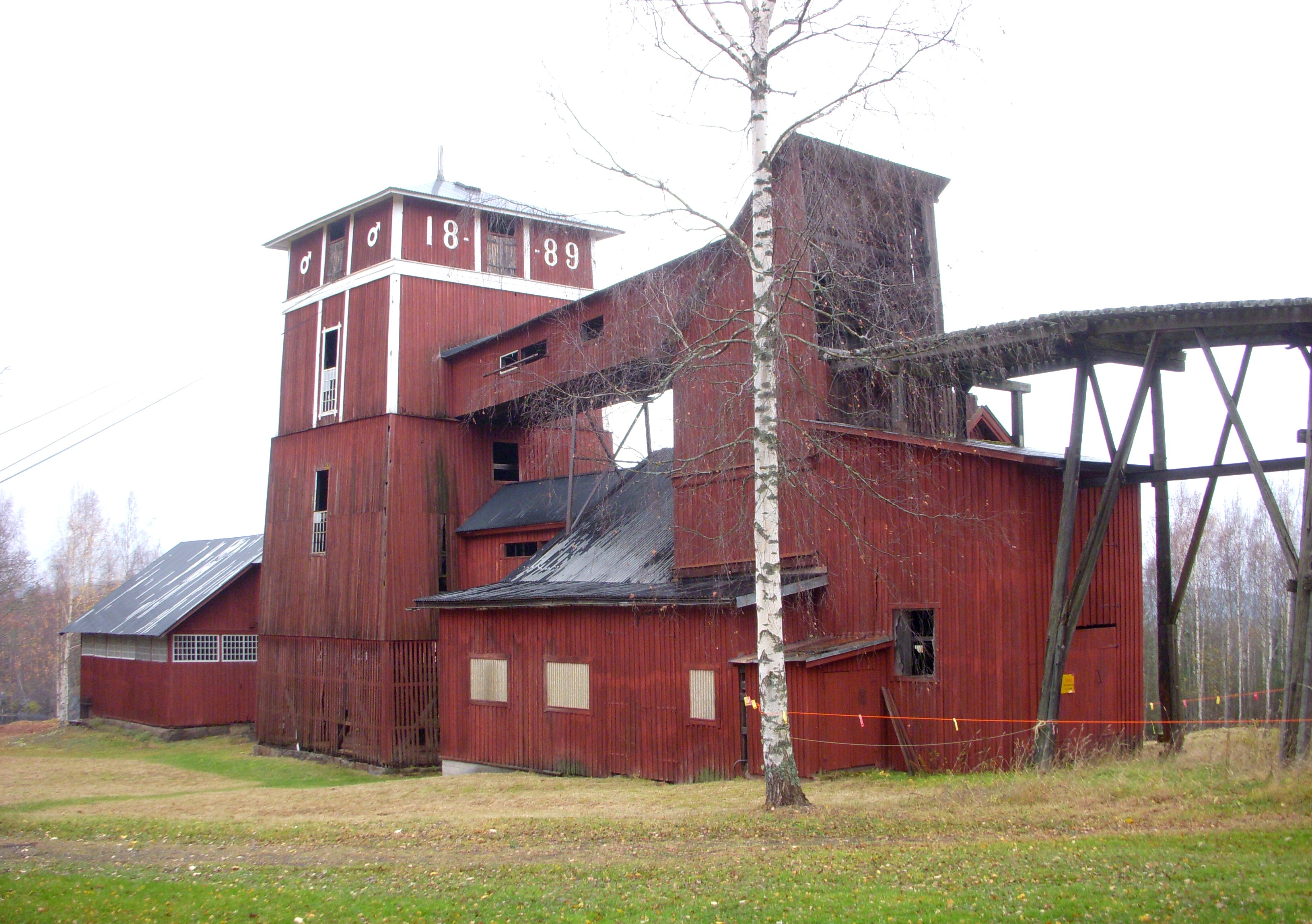 Bispbergs gruva